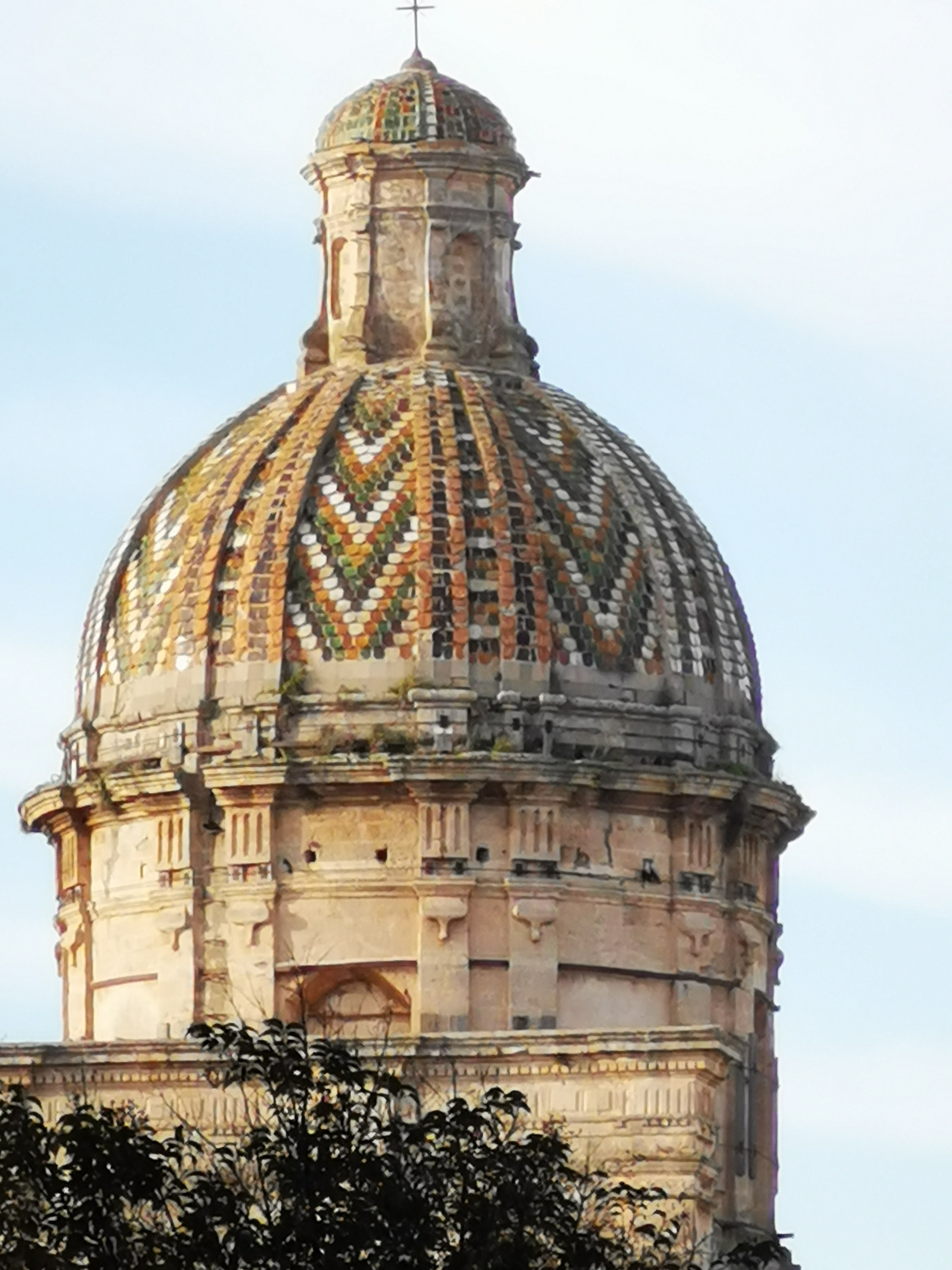 Cupola della Chiesa di San Sebastiano, Francavilla Fontana